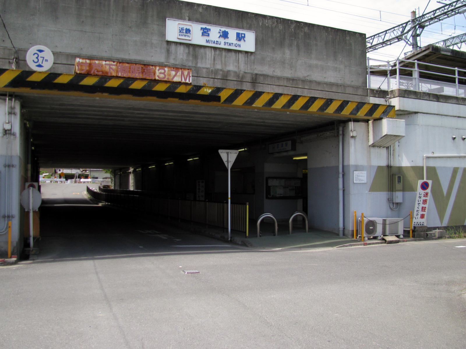 近鉄宮津駅